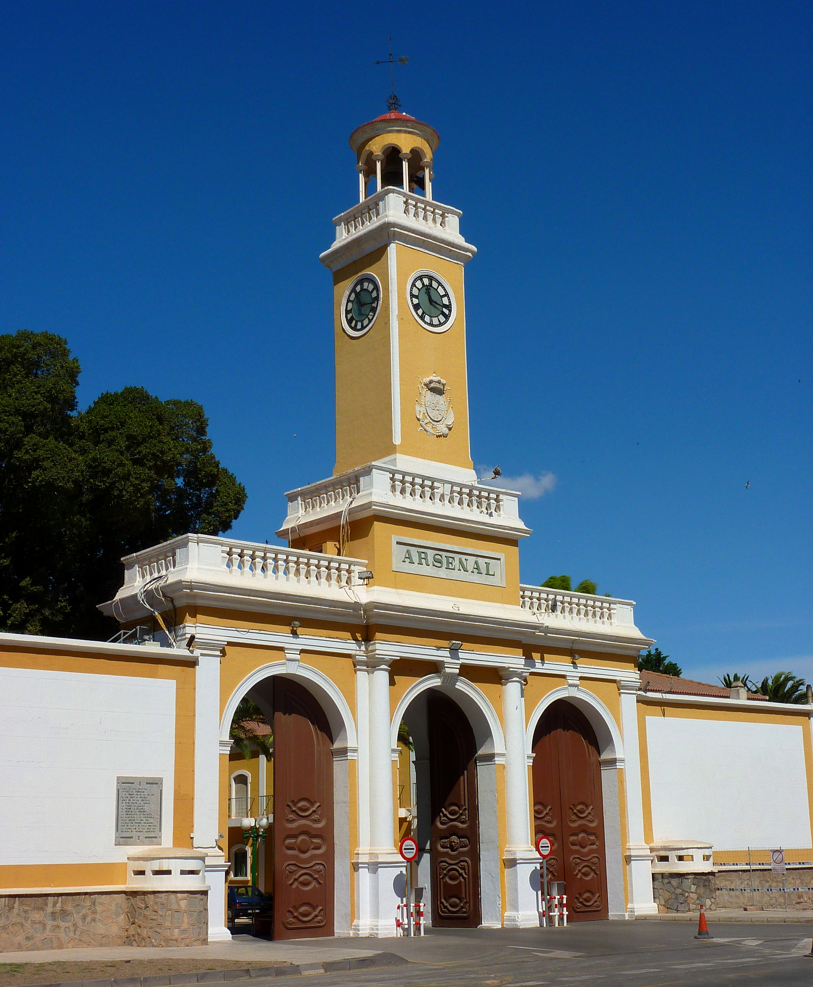 Entrada del Arsenal de Cartagena.